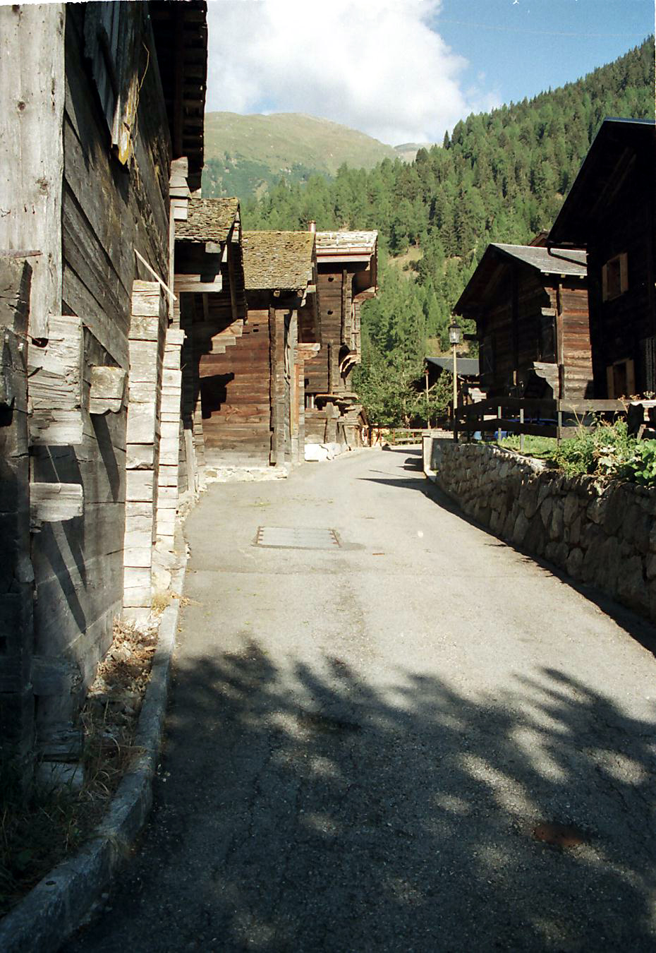 Dorfstraße in Ritzingen